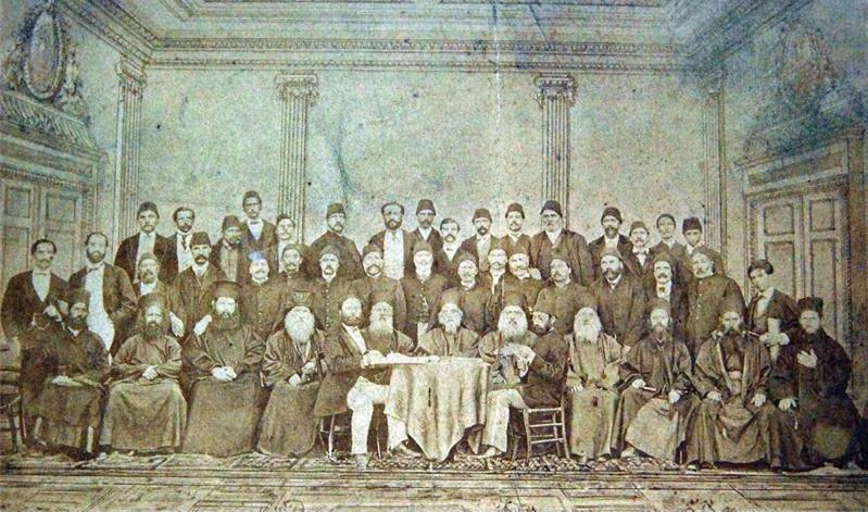 Българския народен събор в Цариград 1871